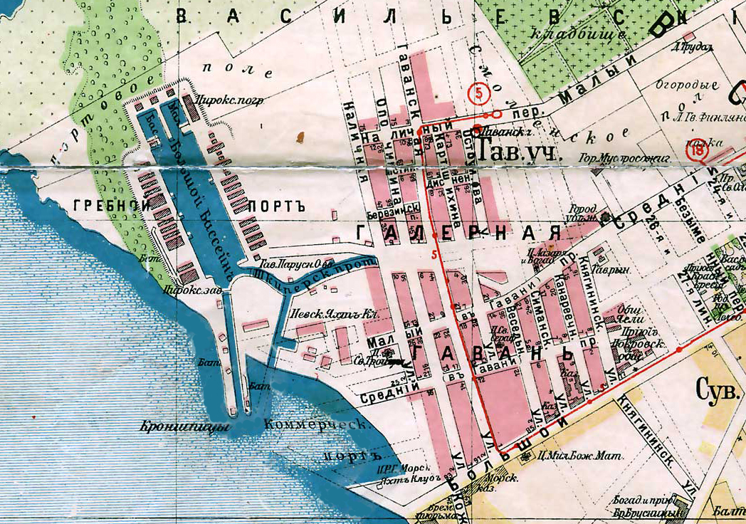 Галерная гавань на карте Петрограда 1916 года